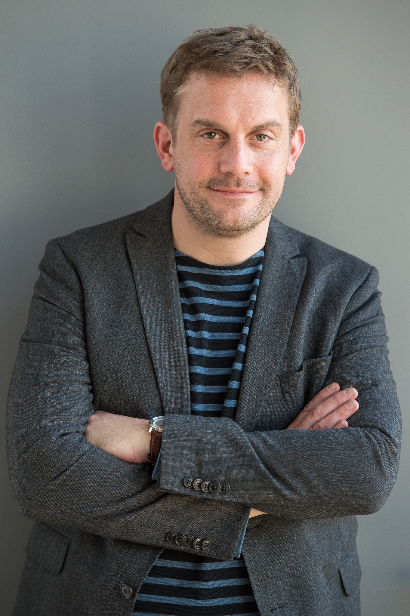 BR,Bayerischer Rundfunk,Bayerisches Fernsehen,Filmbrunch 2017,Sebastian Bezzel